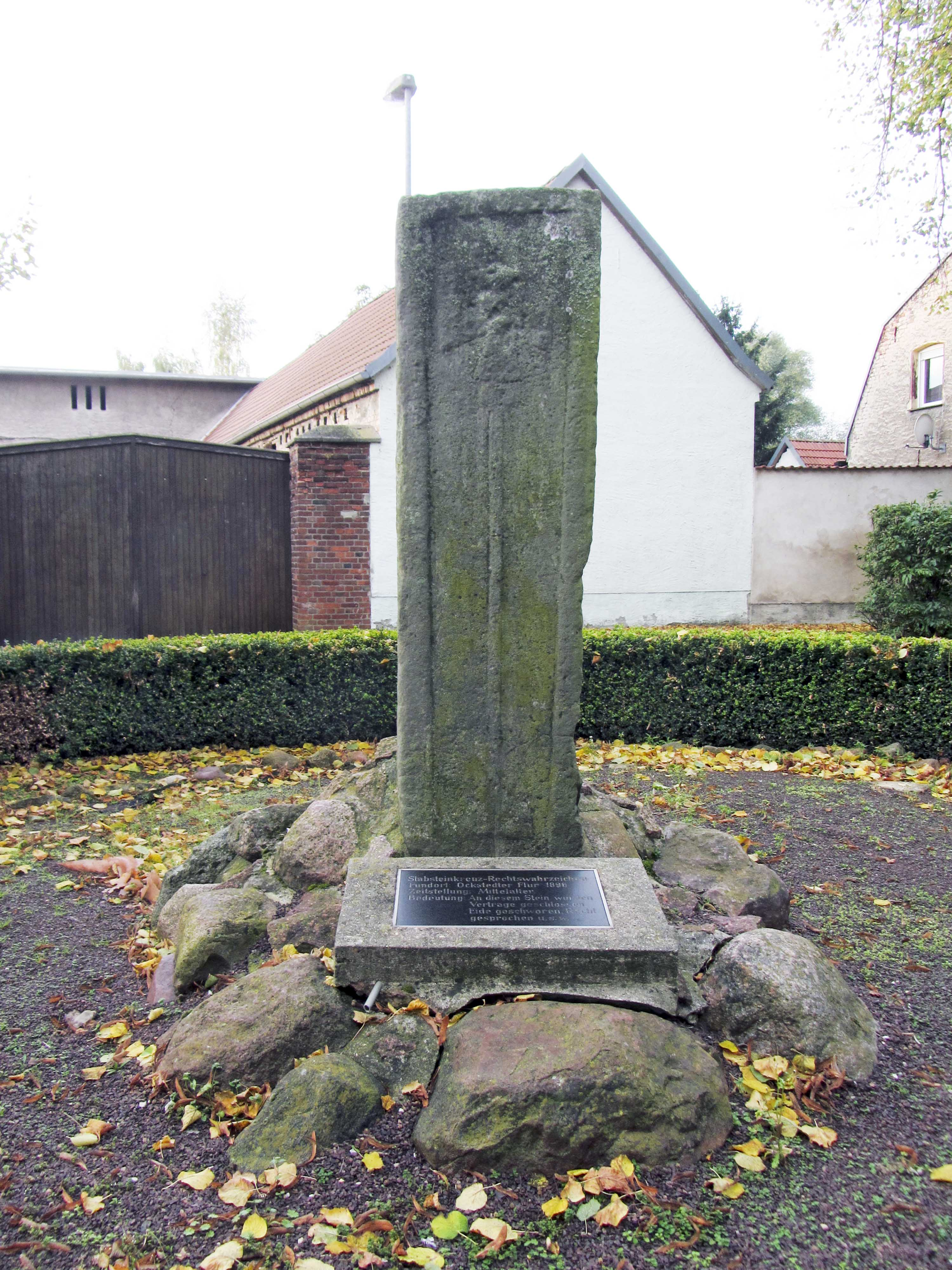 Dorfgerichtsstein, Stabsteinkreuz-Rechtswahrzeichen in Löbnitz, gefunden 1896 auf Ockstedter Flur